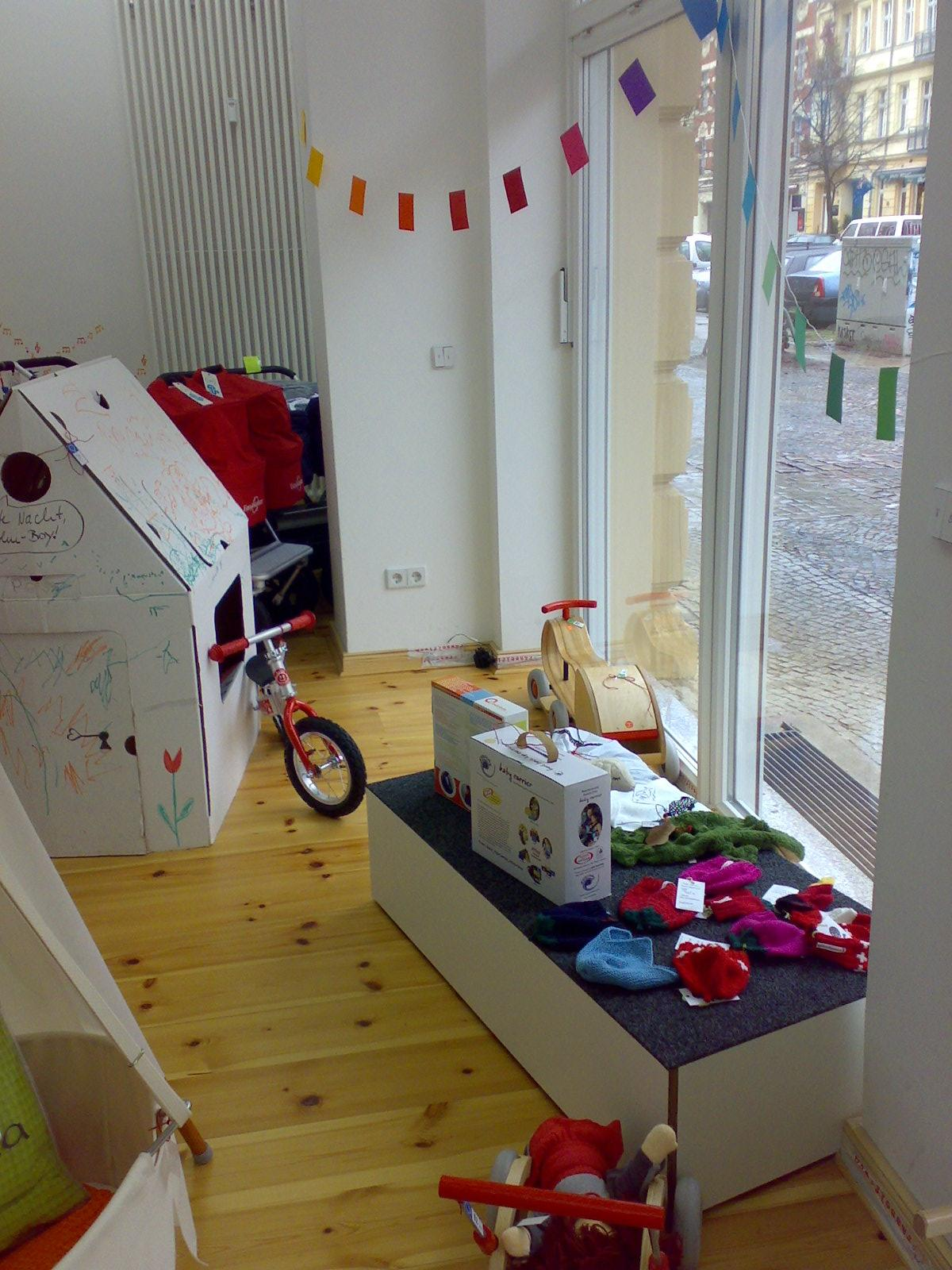 Kinderladen Rasselfisch in Berlin-Prenzlauer Berg, Rykestrasse 44